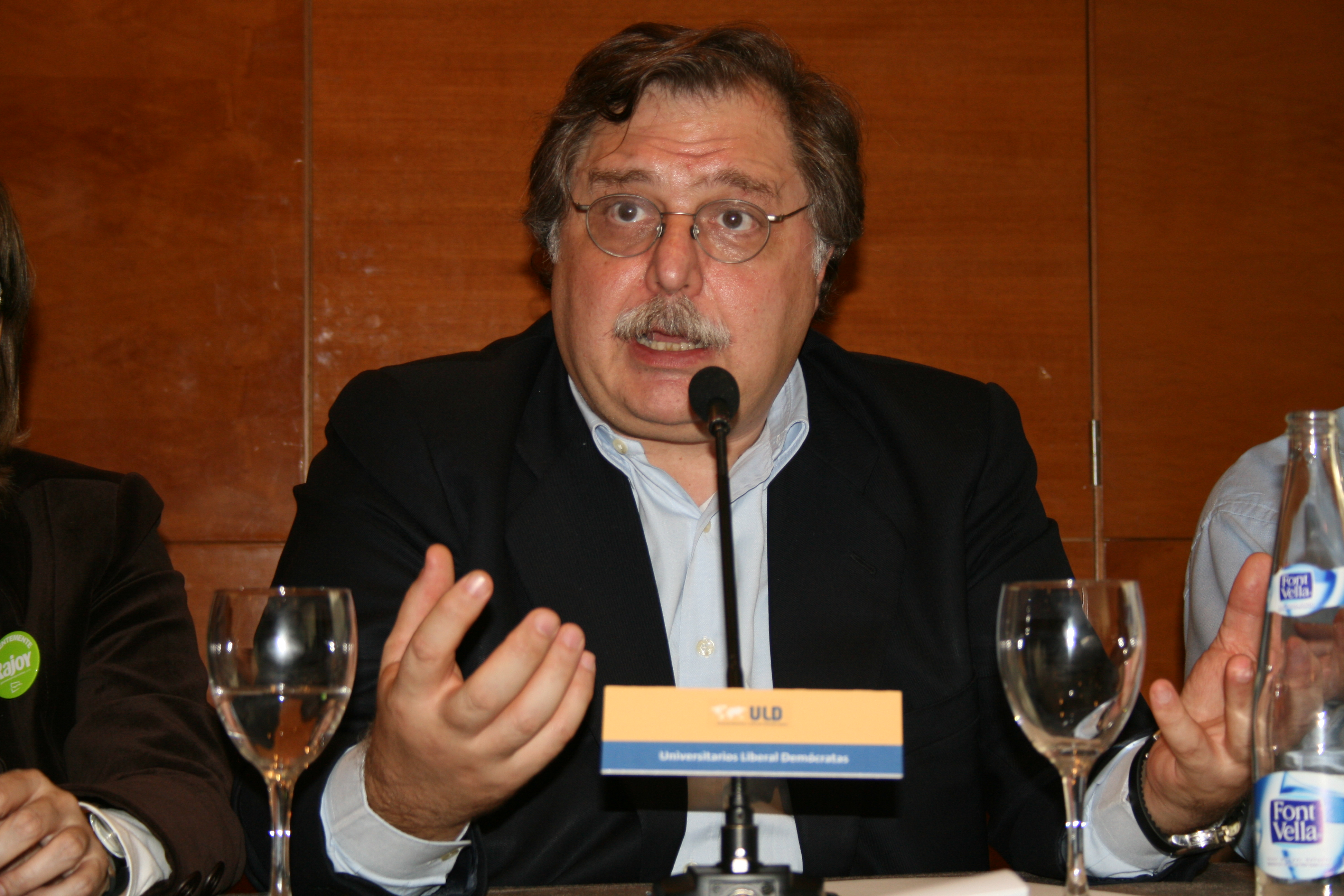 Luis Herrero en una conferencia contra el canon digital en la campaña de 2008